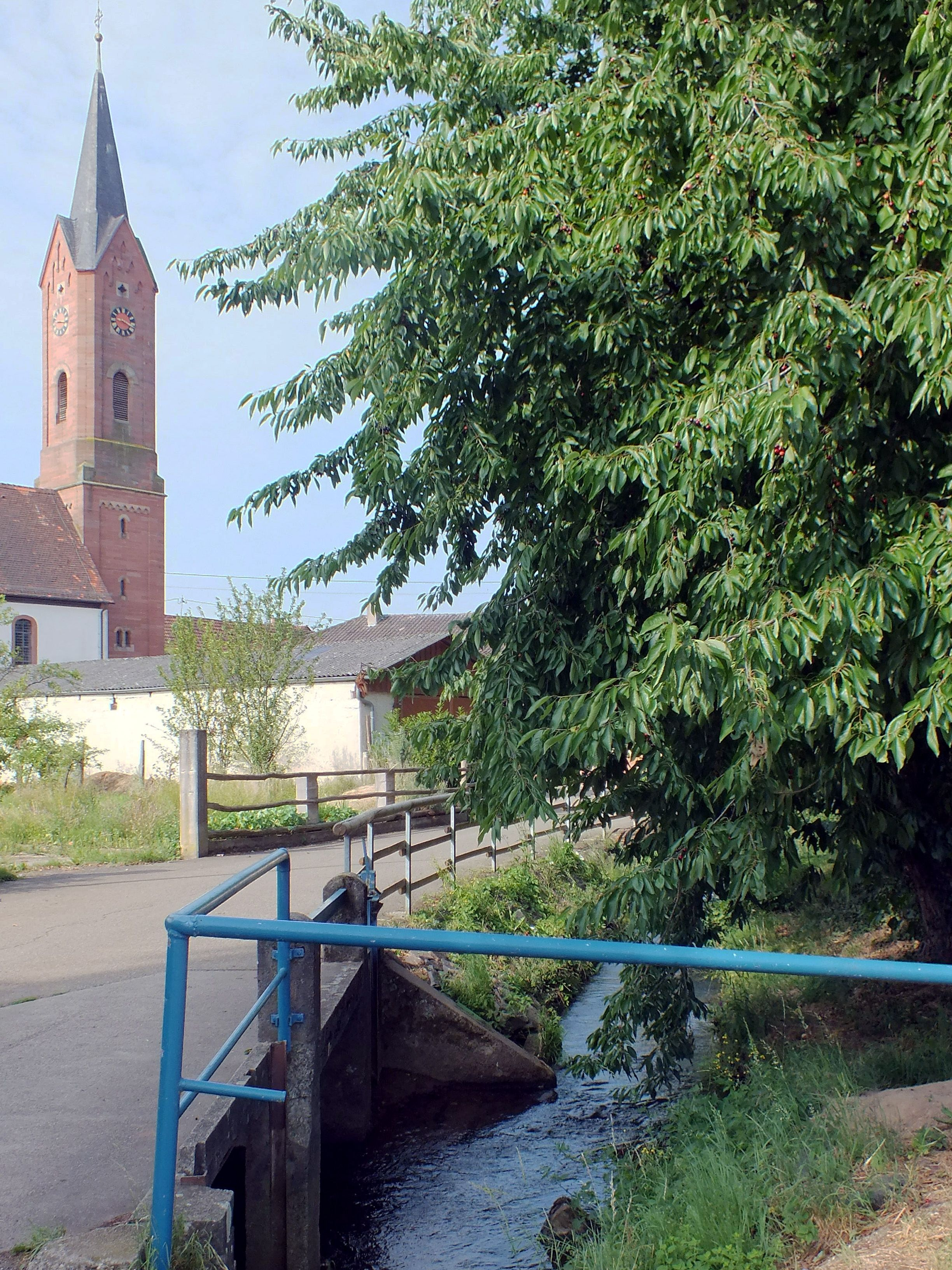 Der Erlenbach in Kapellen-Drusbach